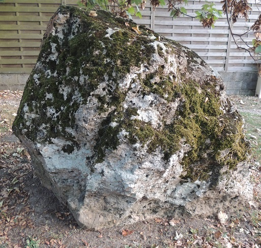 Armoire de Condé Sainte Libiaire à Coupvray; menhir plus large que haut avec des mousses sur les pans supérieurs très irréguliers; feuilles mortes sur herbes rares autour et palissade à l'arrière